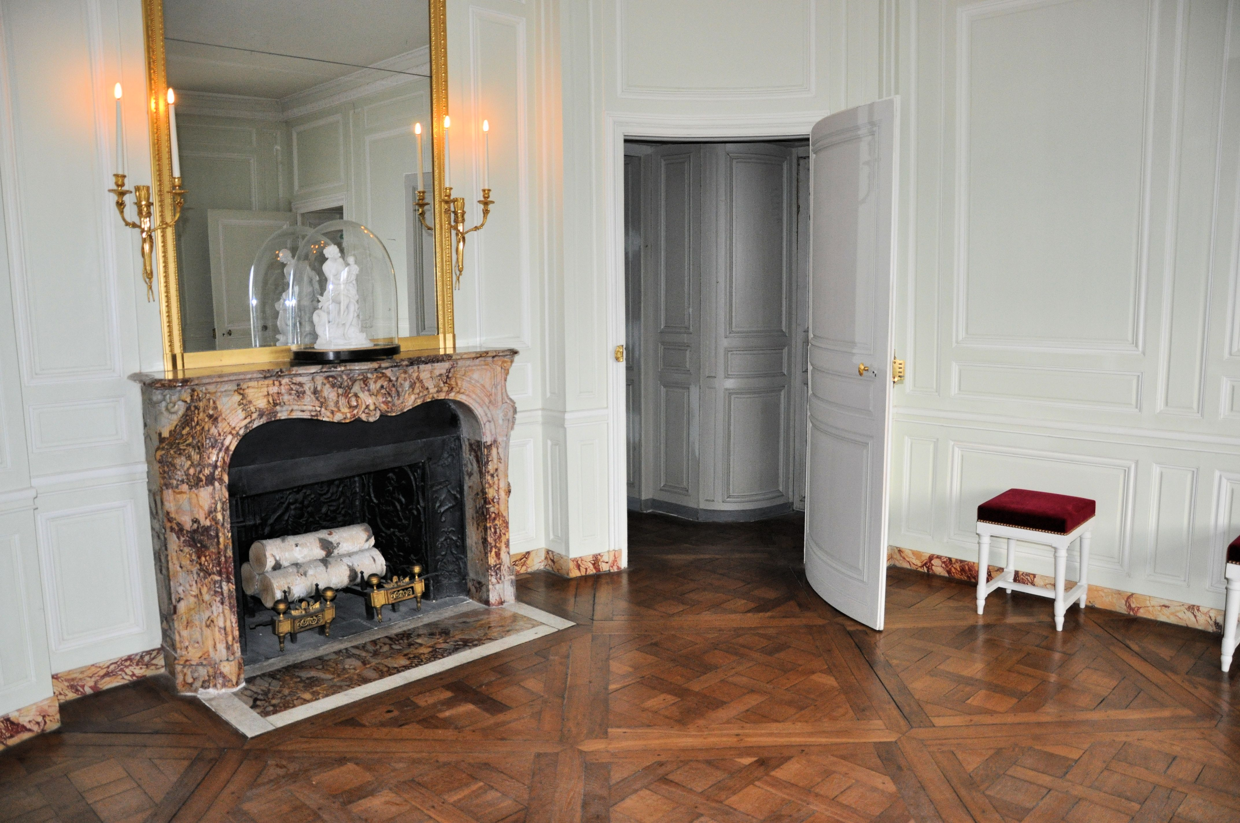 Attique du Petit Trianon - Antichambre du roi